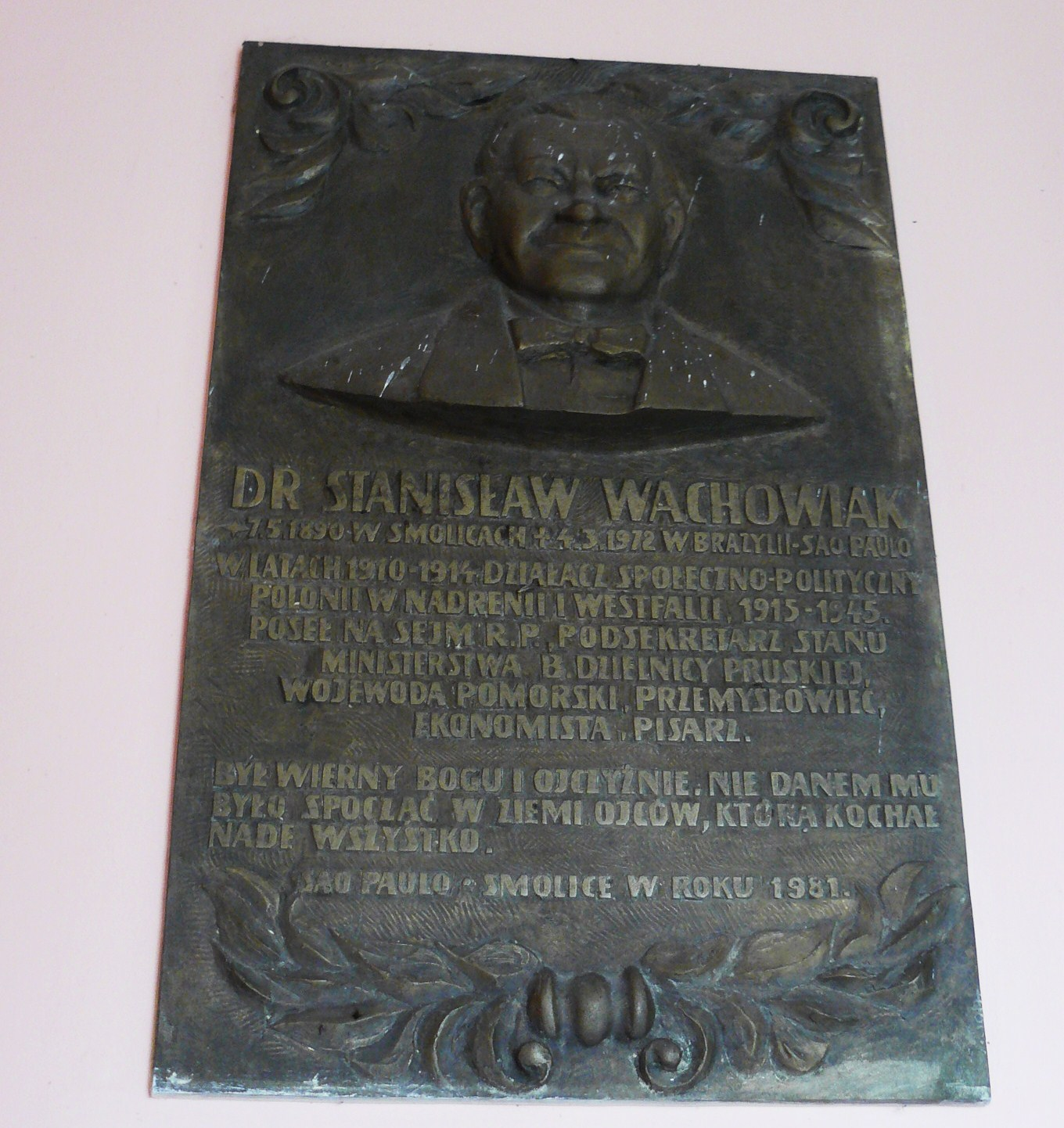 Kościół neobarokowy w Smolicach wraz z cmentarzem i otoczeniem.